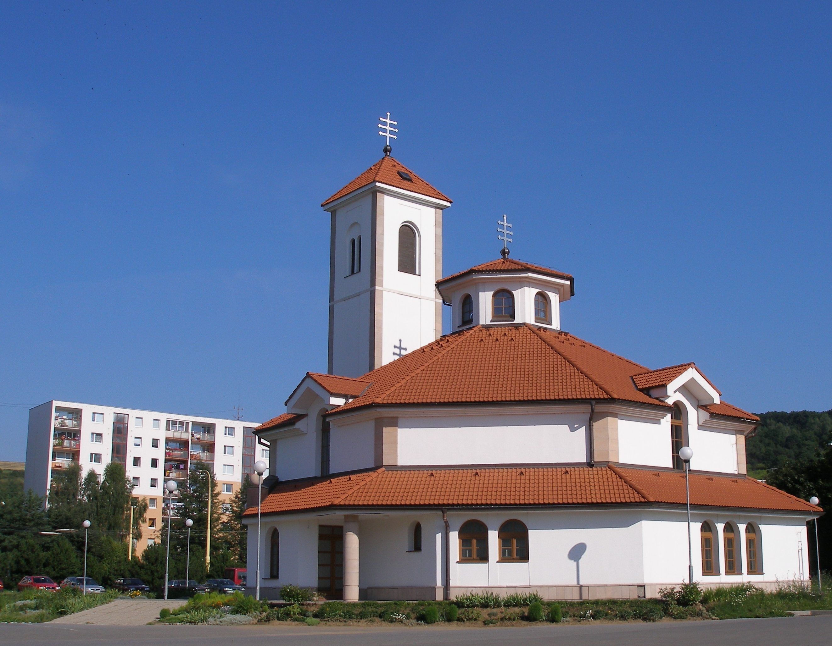 Gréckokatolícky farský chrám blaženého hieromučeníka Pavla Petra Gojdiča na Sídlisku III, Prešov.